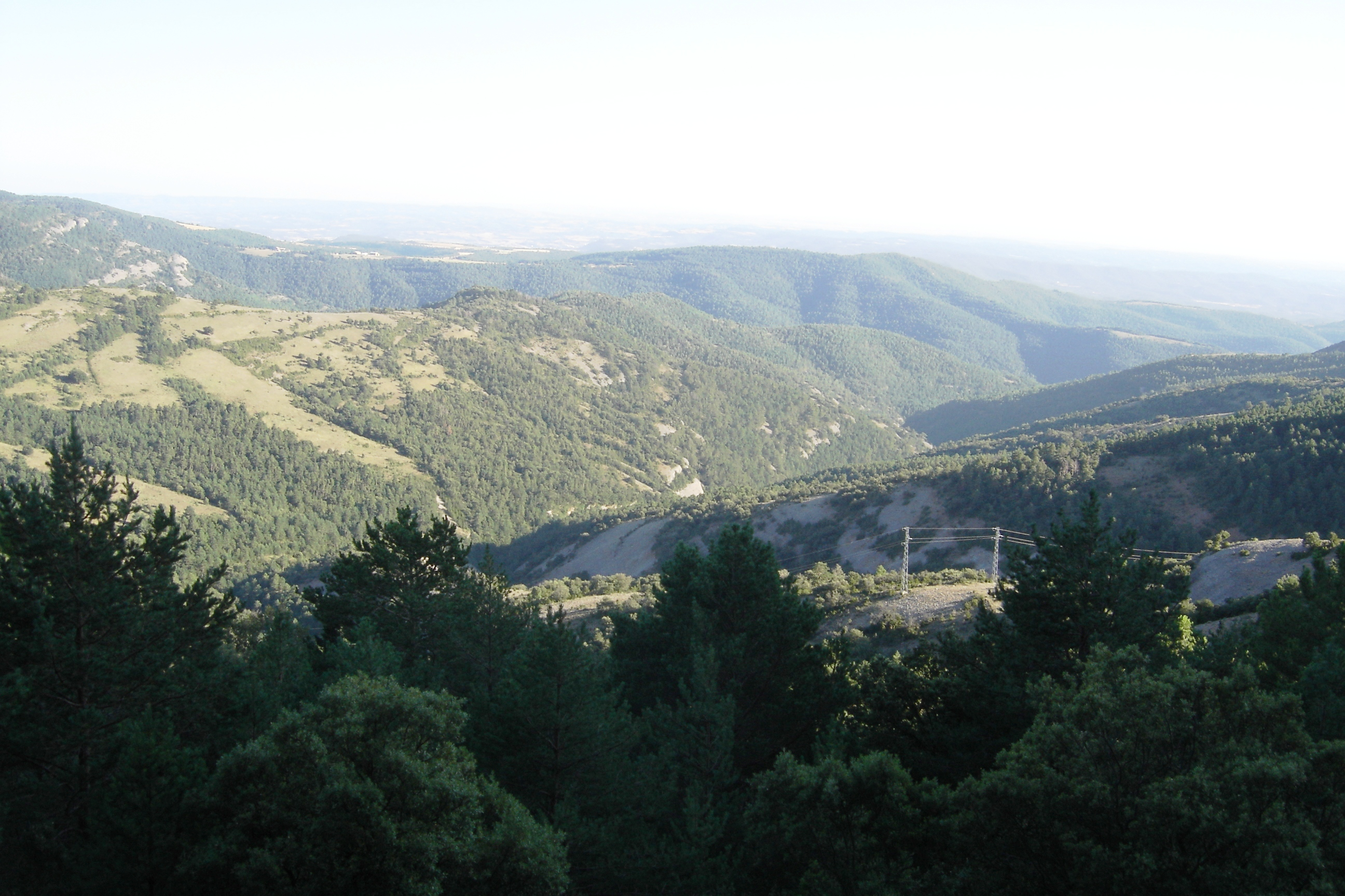 La ziga-zaga del Torrent de Junyent des de la Carretera de Coll de Jou a Cambrils d'Odèn. Flanquejant-lo, a la dreta, el bosc de Cavallera, a l'esquerra, la serra de Canalda i al fons, de banda a banda de la imatge, la part superior de la vall de la riera de Canalda on desguassa